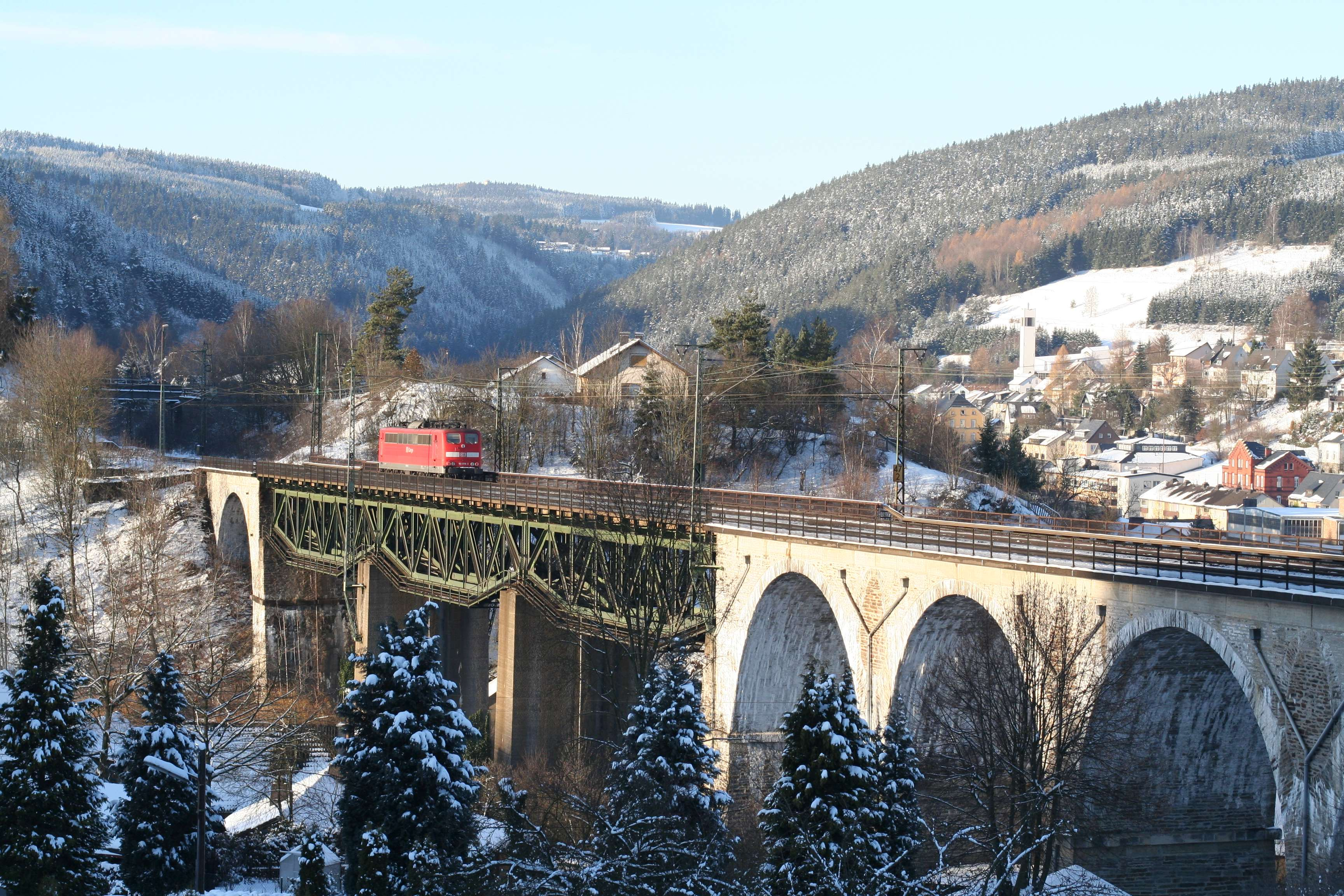 Trogenbachbrücke